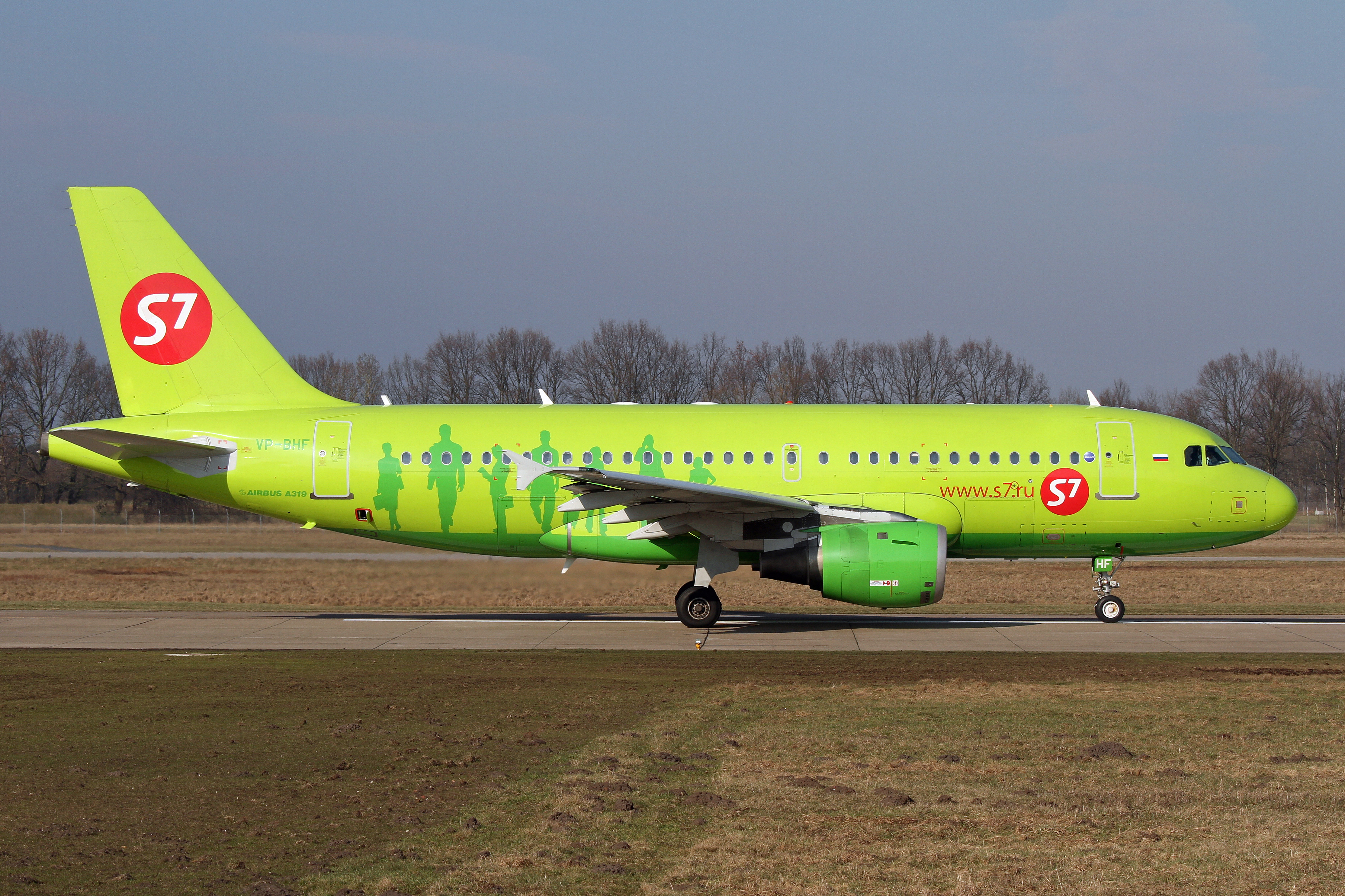 IMG_4132X